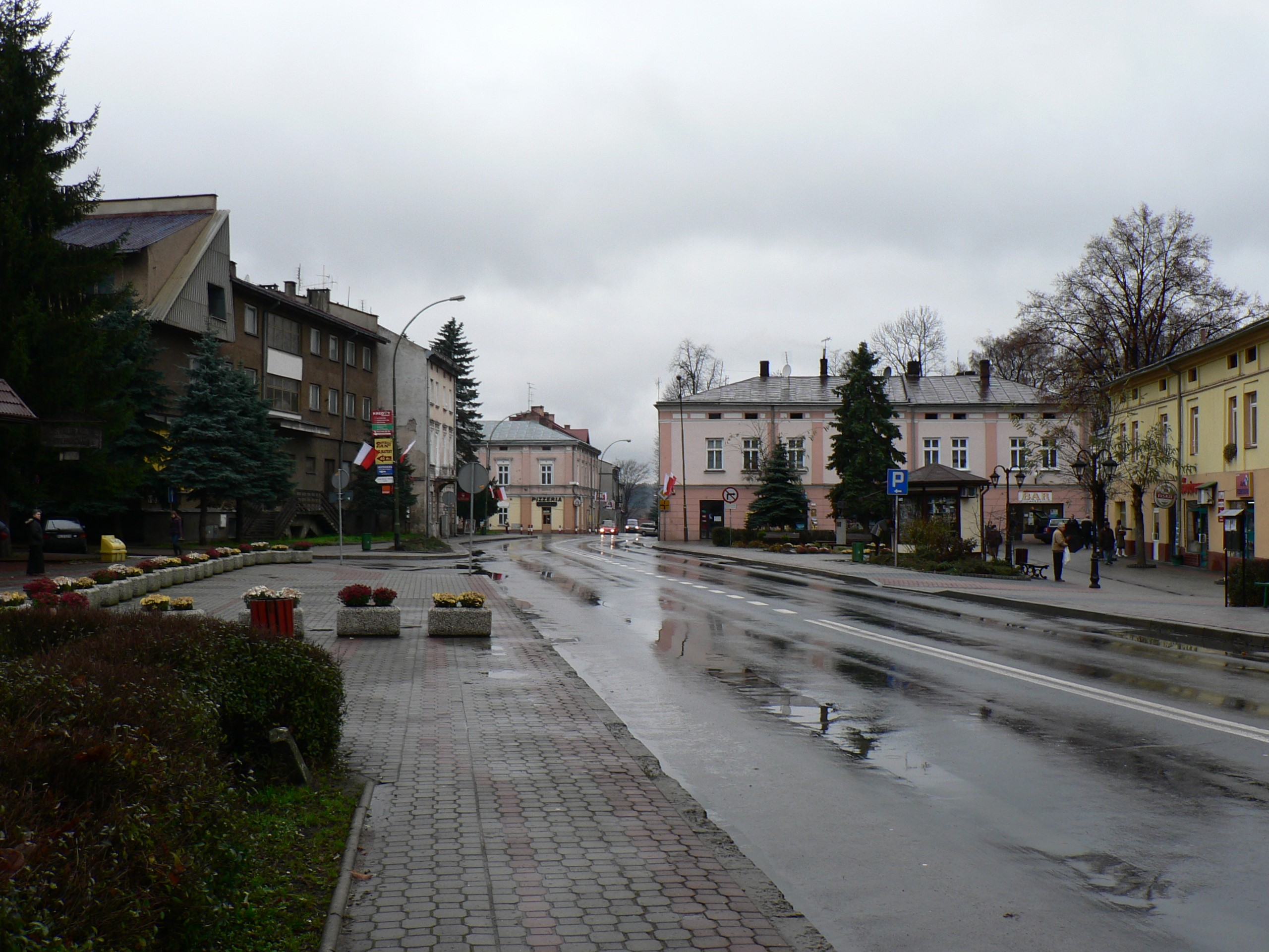 Rynek w Lesku